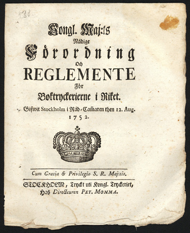 Titelsidan till Boktryckerireglementet 1752.